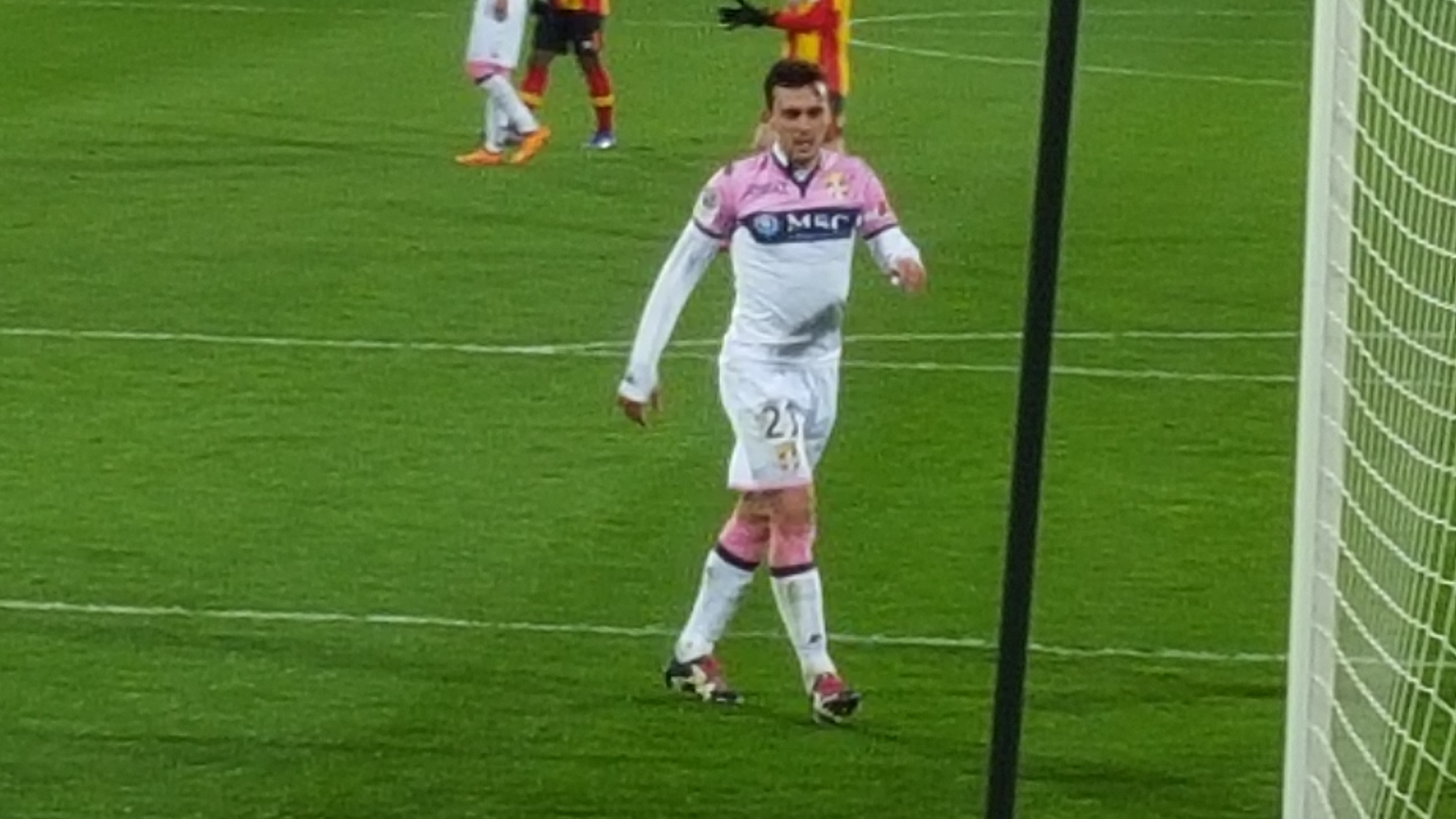 Gustavo Campanharo lors du match RC Lens / Evian TG, comptant pour la vingt-huitième journée du Championnat de France de football de Ligue 2, le 29 février 2016, au Stade Bollaert Delelis